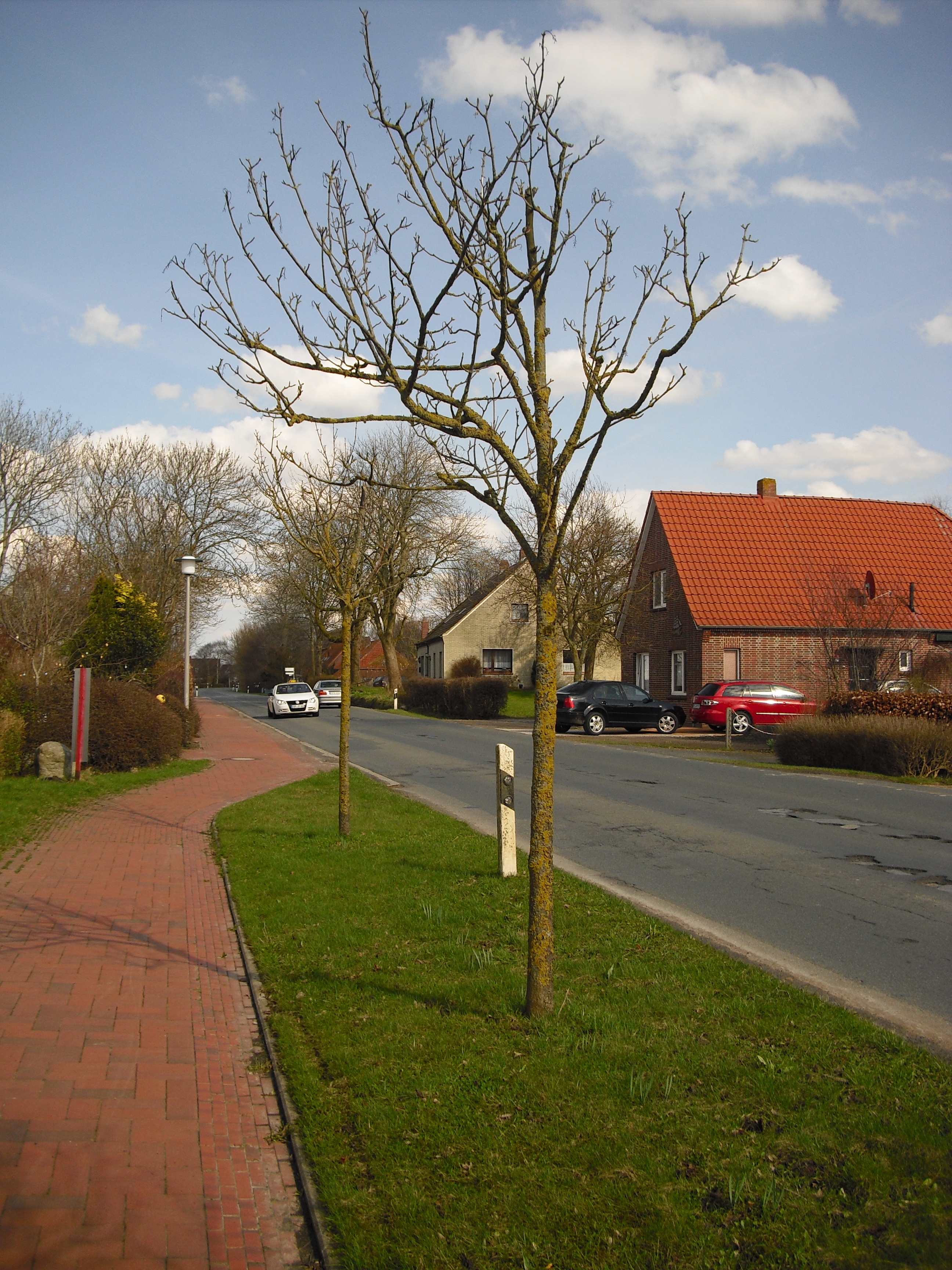 Landstraße in Ostermarsch